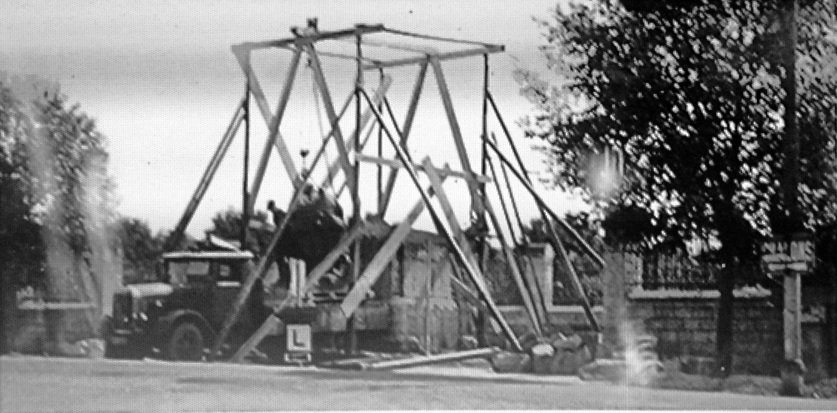 démentèment du monument lors de la deuxième guerre mondiale, photographie présenté dans le cadre des commémorations du centenaire.